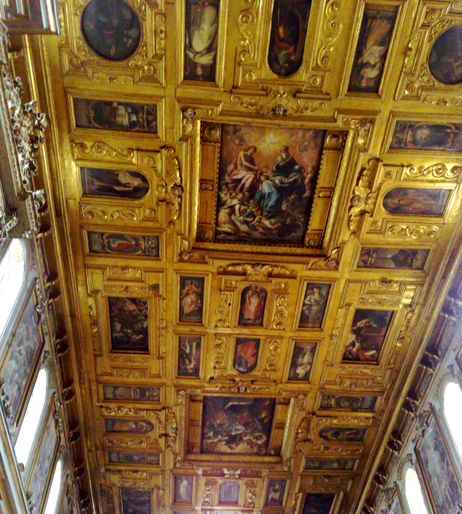 Santa Maria La Nova (Napoli) - Particolare del Soffitto